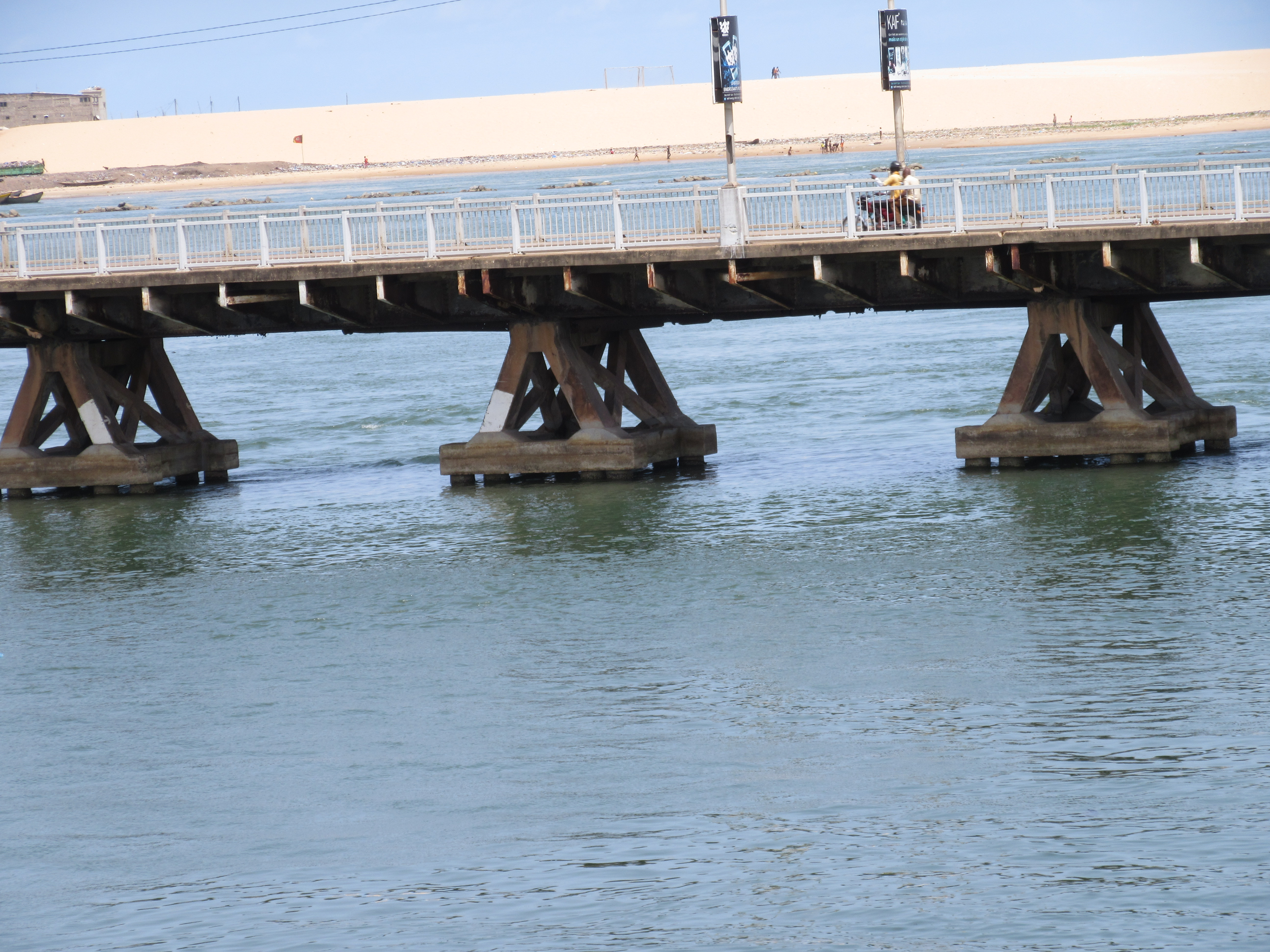 l'ancient pont à Cotonou This is an image with the theme "Africa on the Move or Transport" from: Benin